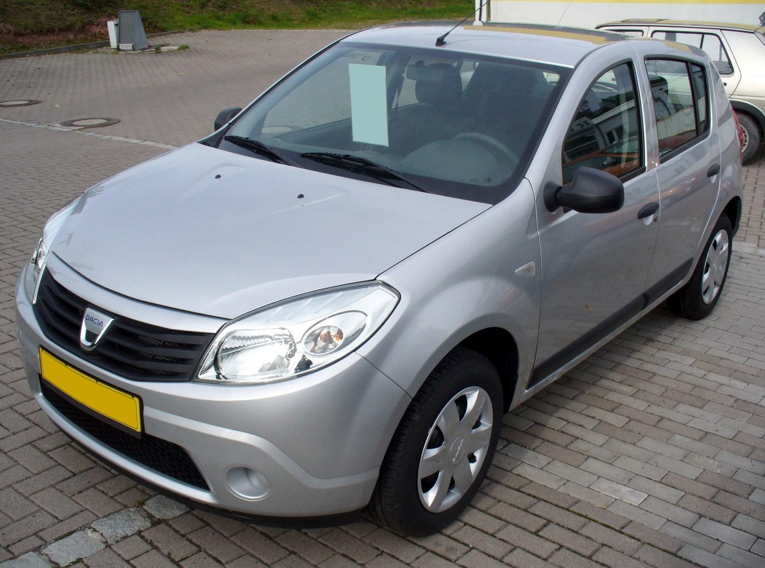 Dacia Sandero